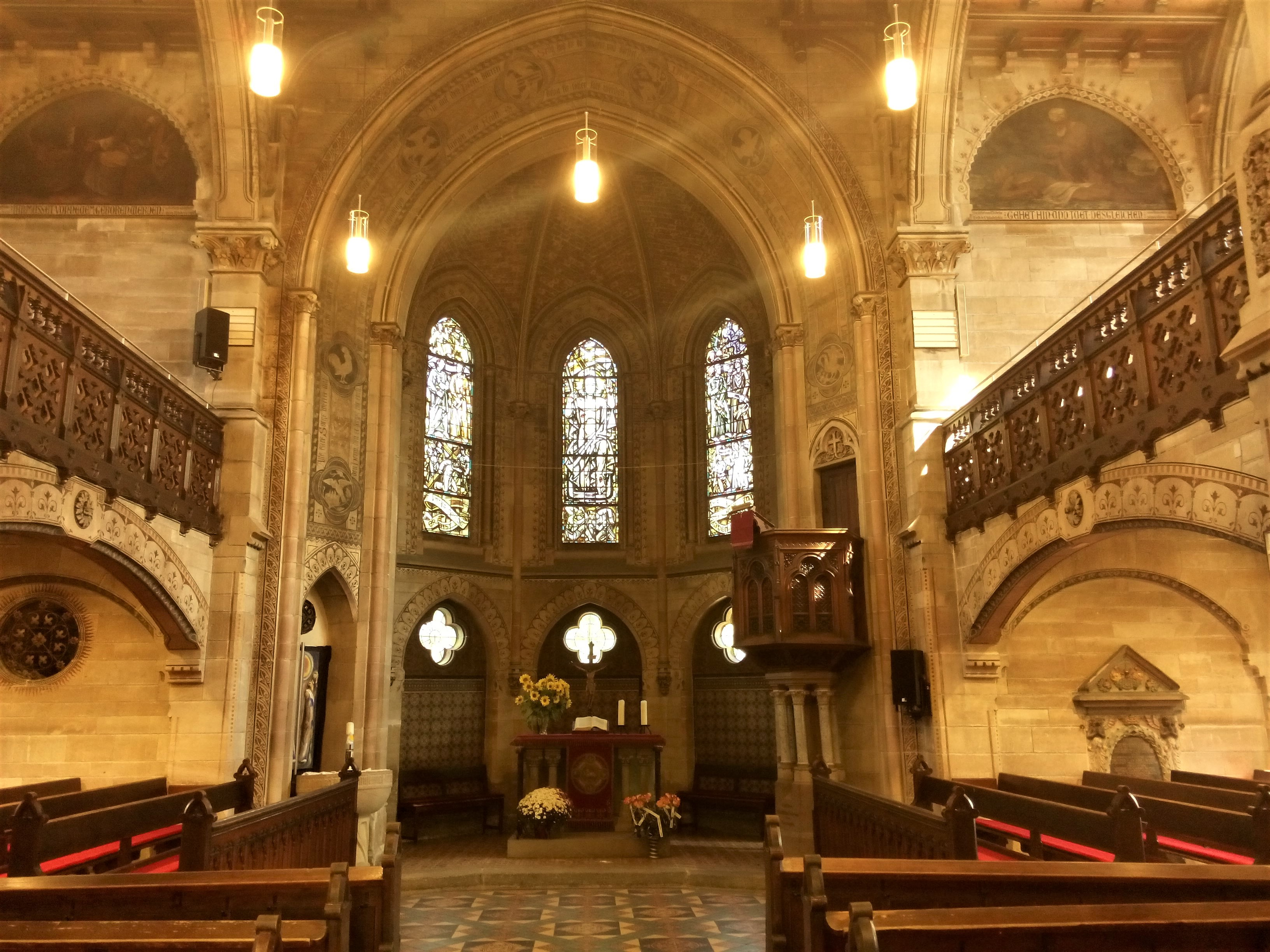 mit neuen Lampen